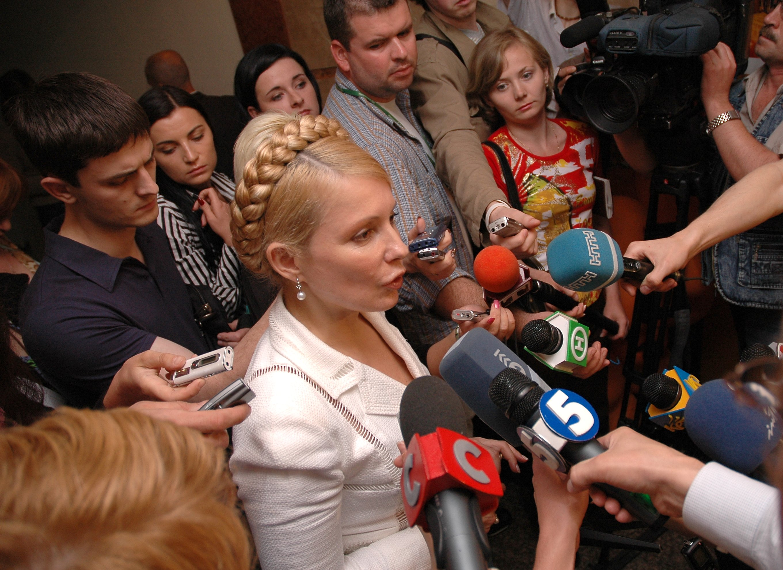 Юлия Владимировна даёт эрзац-пресс-конференцию в фойе штаба НСНУ после переговоров по созданию "Демократической Коалиции"